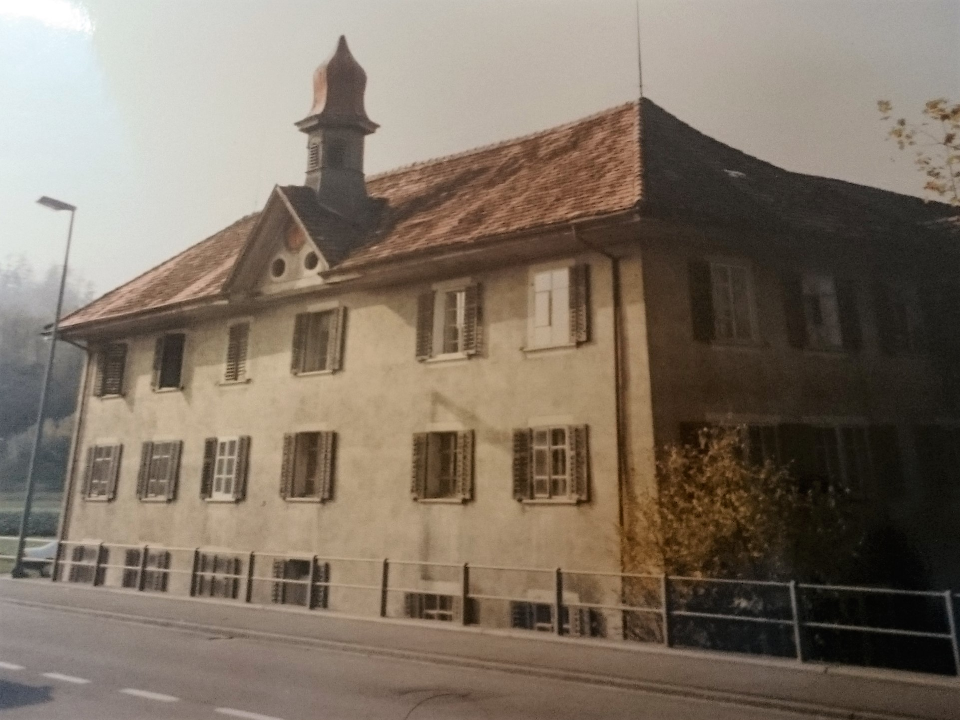 Ehemaliger Gasthof Bären in Windisch. Fahrgut 124. Nordöstliche Fassade. Foto von Februar 1985, KGS ZSO Brugg Region.